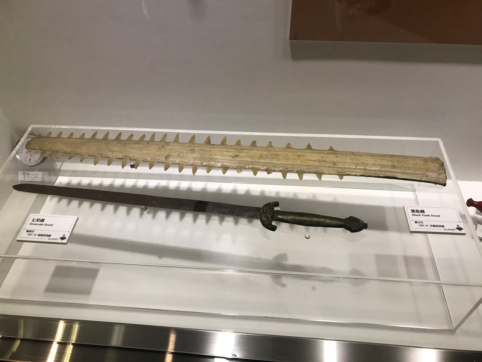 中央研究院民族研究所的鯊魚劍